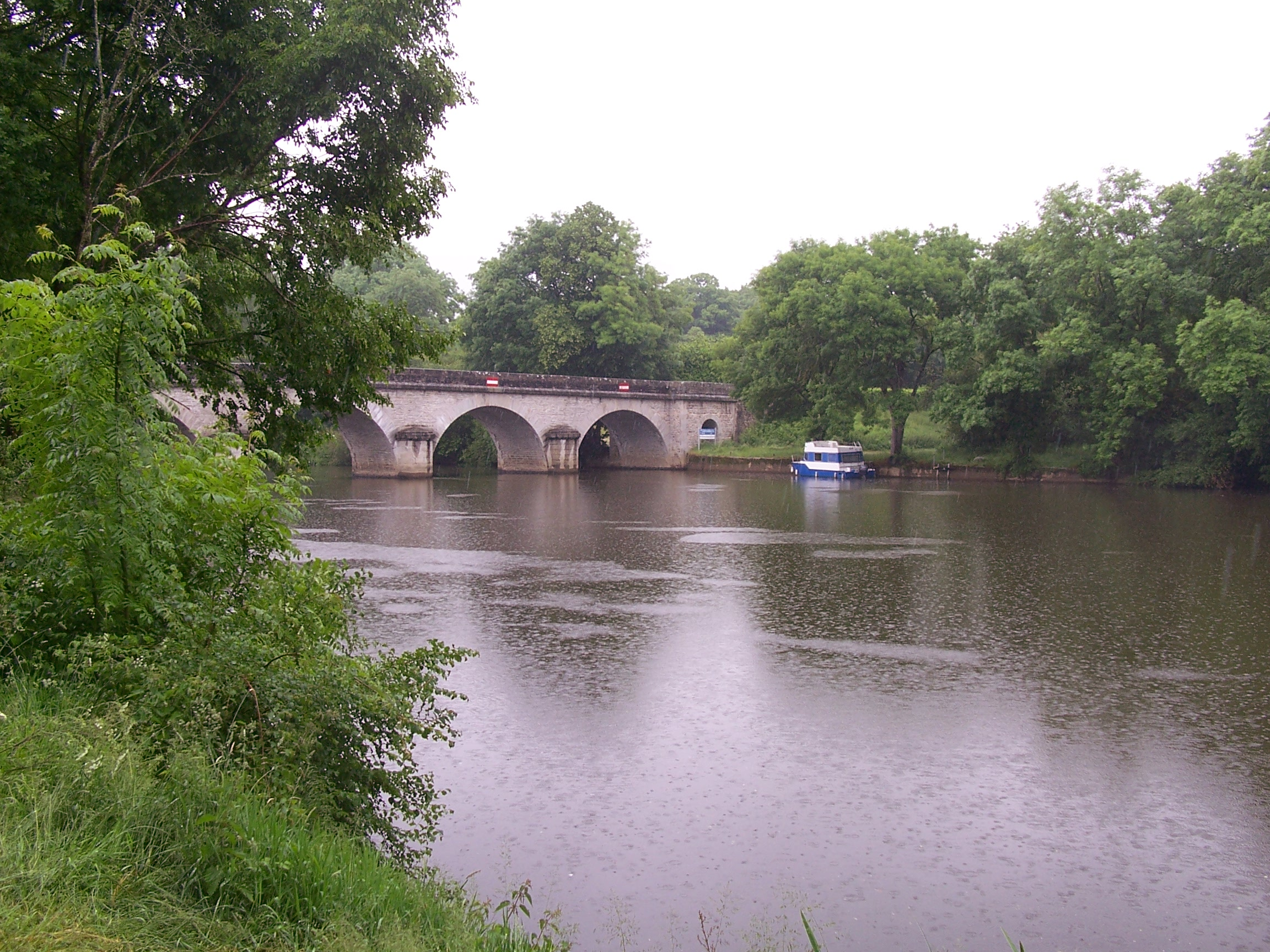 De Mayenne (rivier) in de buurt van Houssay.